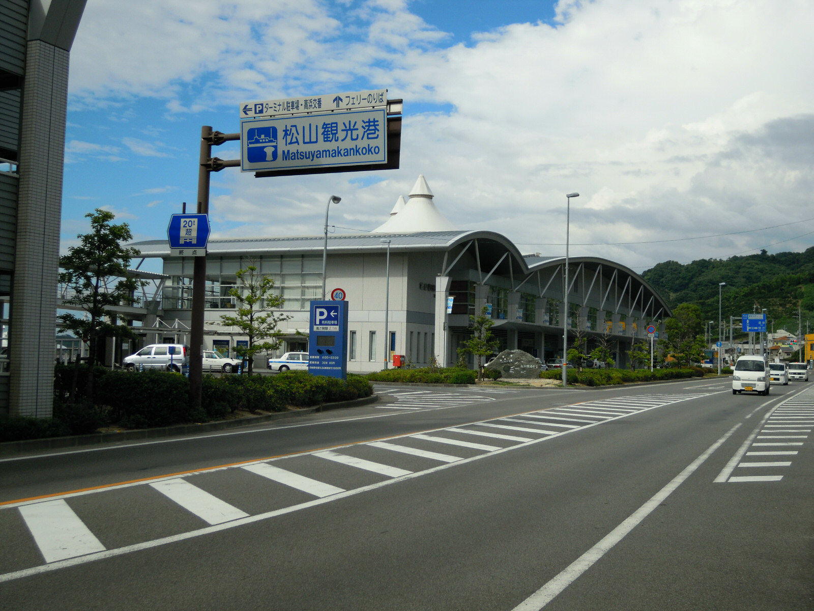 Matsuyama Sightseeing Port